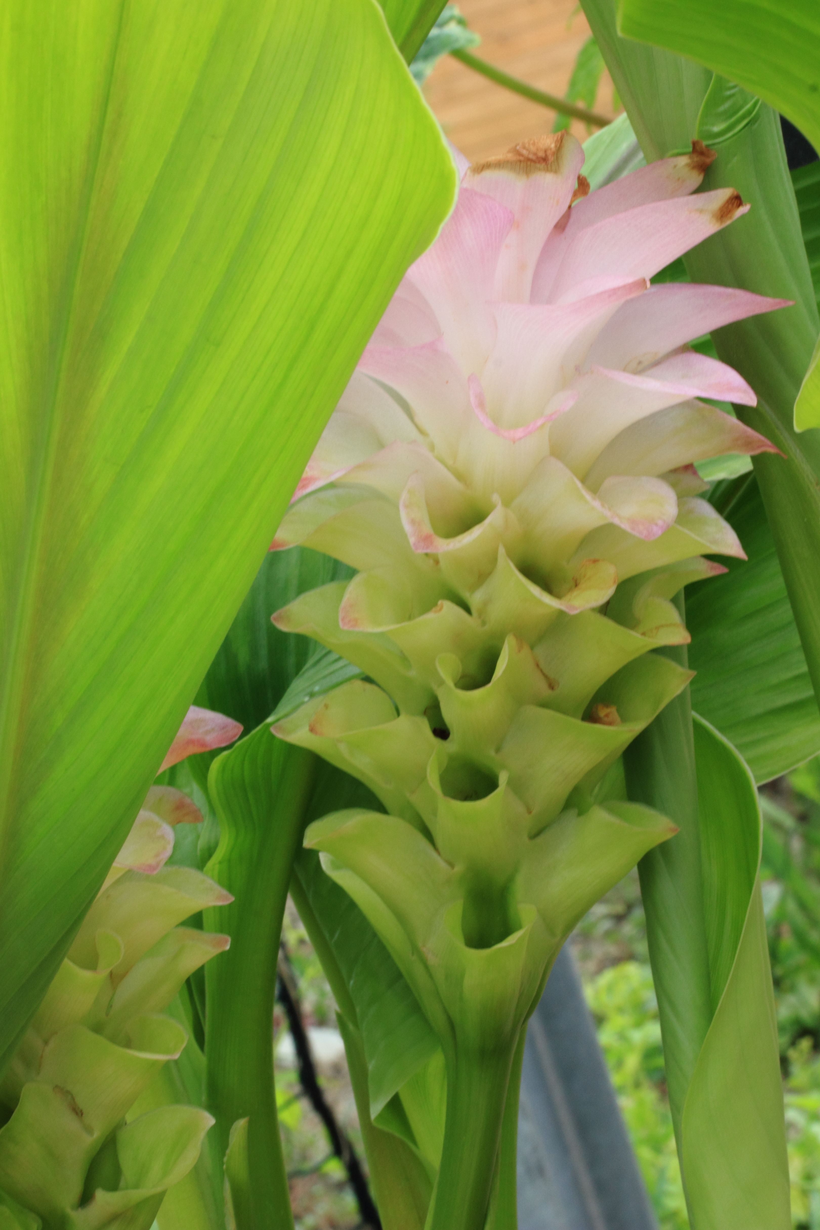 Muséum de Toulouse Native nameMuséum de ToulouseLocationToulouse, FranceCoordinates43° 35′ 37.89″ N, 1° 26′ 57.42″ E Established1796: established ; 1865: opened to publicWeb page control : Q422 VIAF: 130895847 ISNI: 0000 0001 2158 3469 SUDOC: 028667107 BNF: 120455376 Museofile: M7013 institution QS:P195,Q422